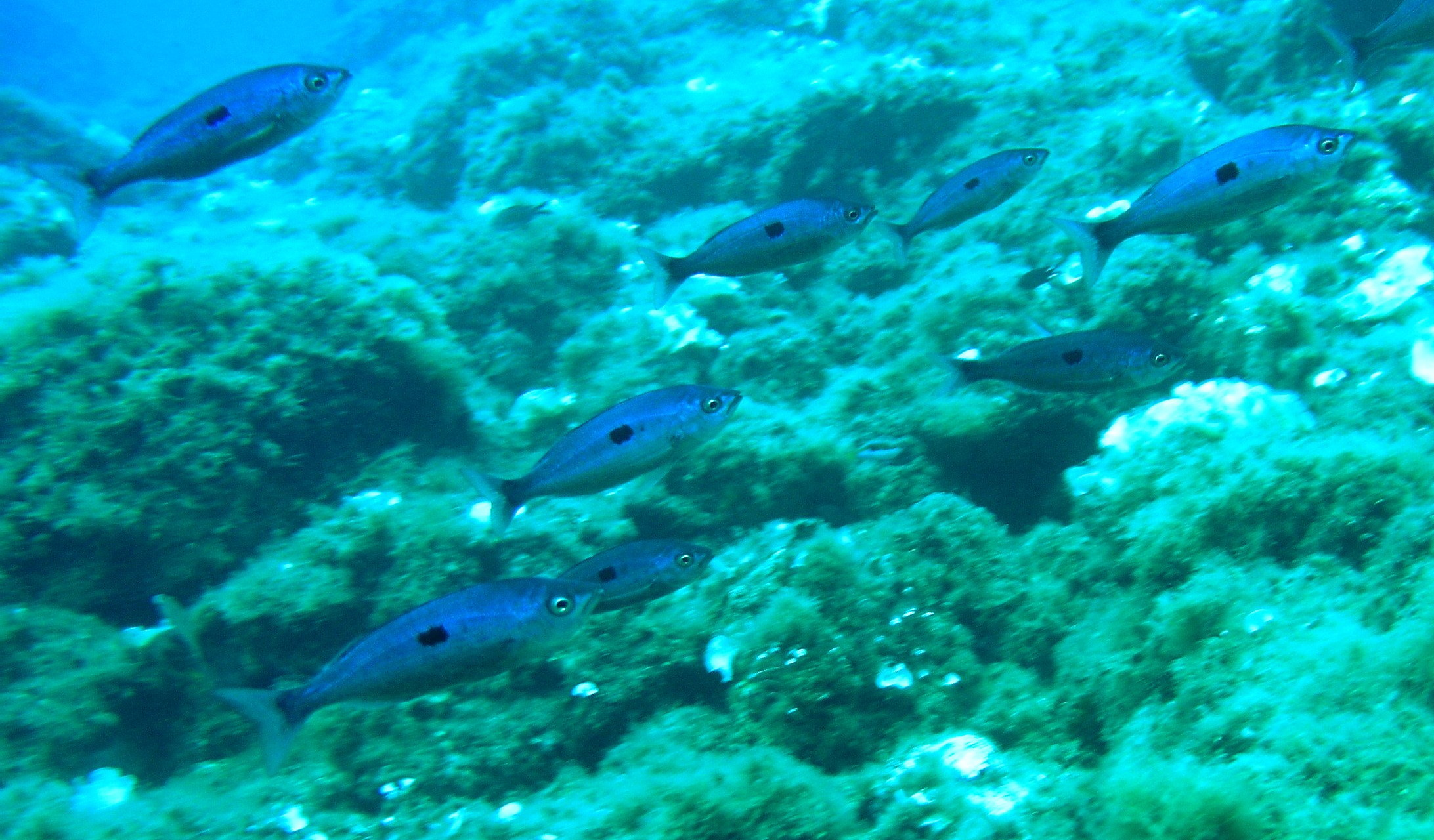 Blotched picarel (Spicara maena)